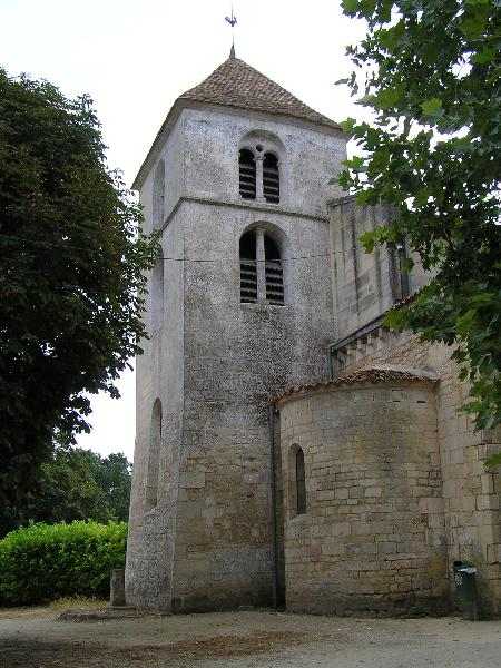 église de Saint-Sulpice-de-Cognac, Charente, France